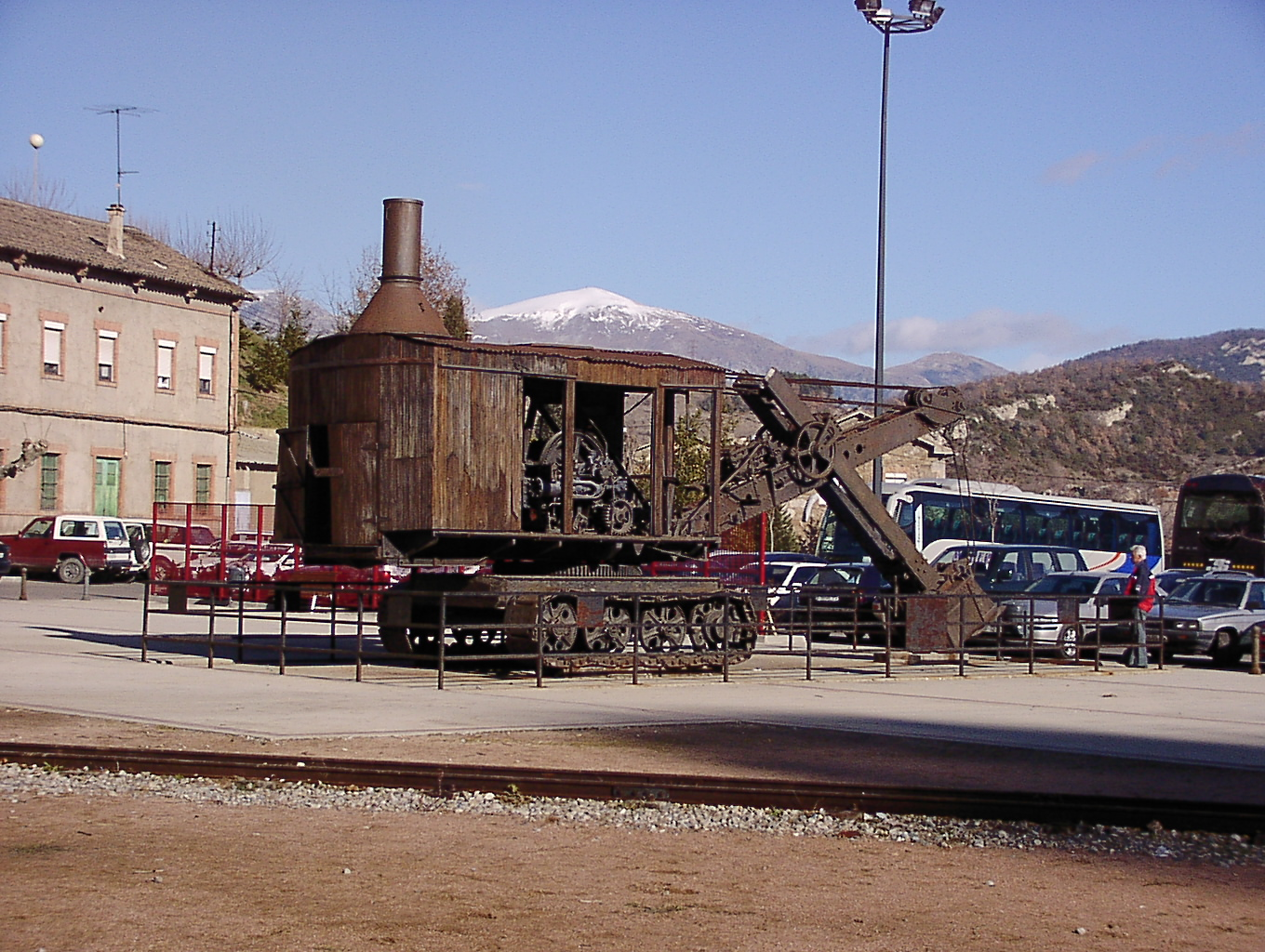 Excavadora de vapor BUCYRUS , adquirida per FOCSA ( Fomento de obras y construcciones S.A. ) al 1922 , va treballar casi tota la seva vida a Barcelona , las seves principals obres van ser. El soterrament de la via al carrer de Aragó de la companyia MZA i la construcció del baixador del Passeig de Gracia. Construcció de la línea I del metro , construcció del autòdrom de Sitges y de la avinguda Diagonal fins Francesc Macià . Finalment va participar a la construcció del estadi del Camp Nou del F.C.B.